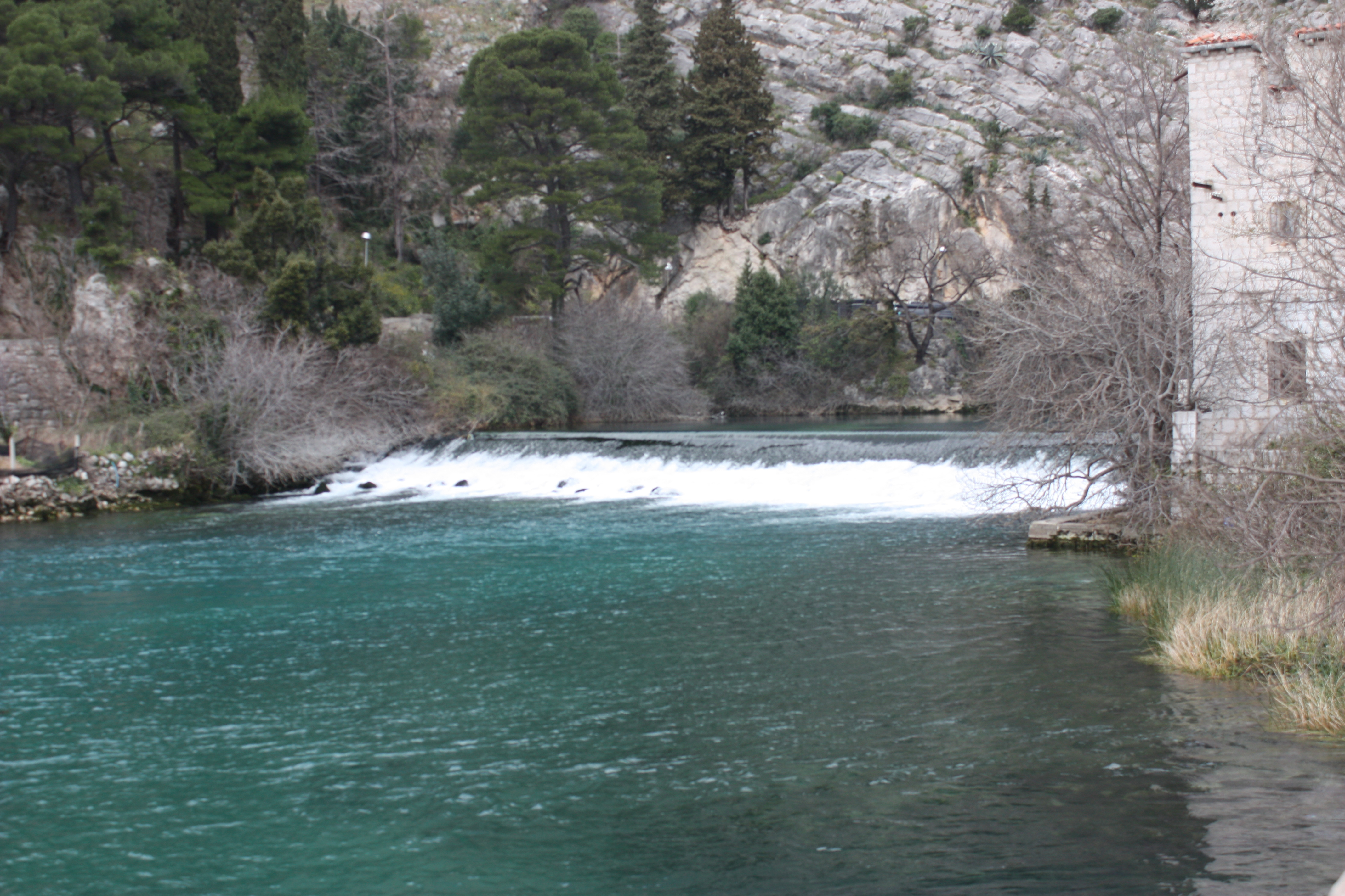 Izvor i ušće Omble